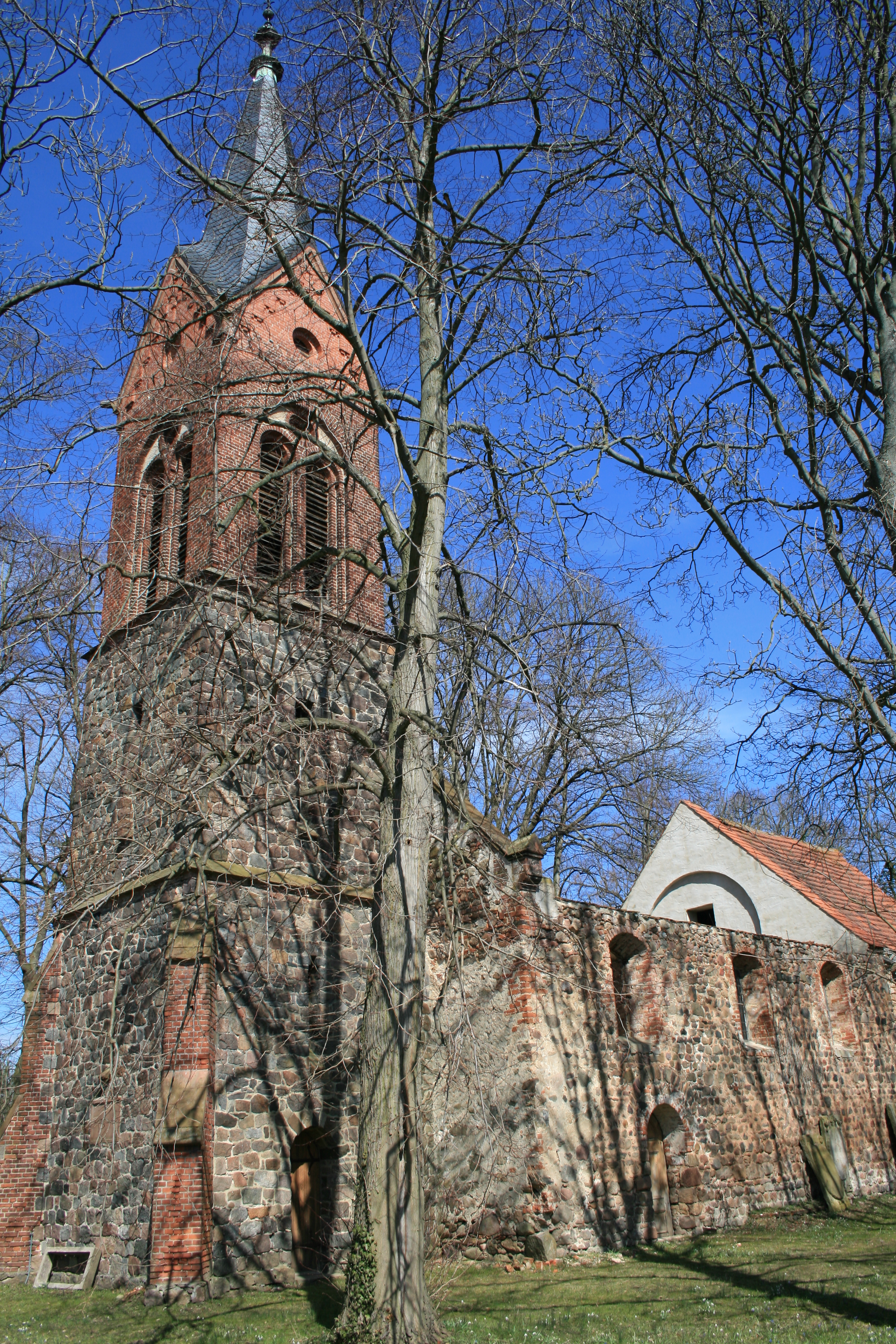 Kirche in Klein Lübars, einem Ortsteil der Stadt Möckern im Landkreis Jerichower Land in Sachsen-Anhalt.